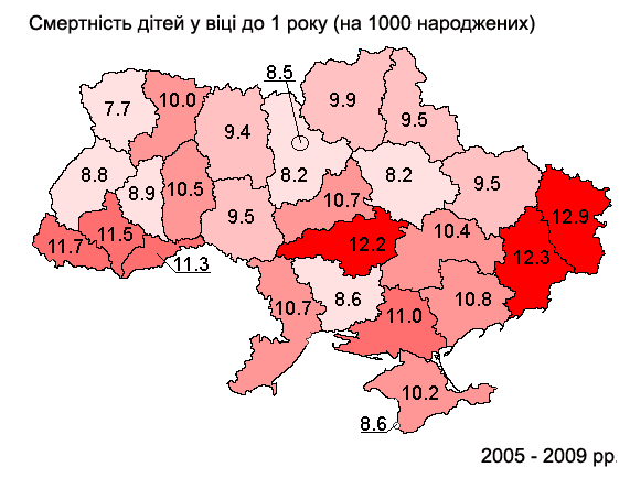 Середньорічна смертність дітей віком до одного року у 2005 - 2009 рр.